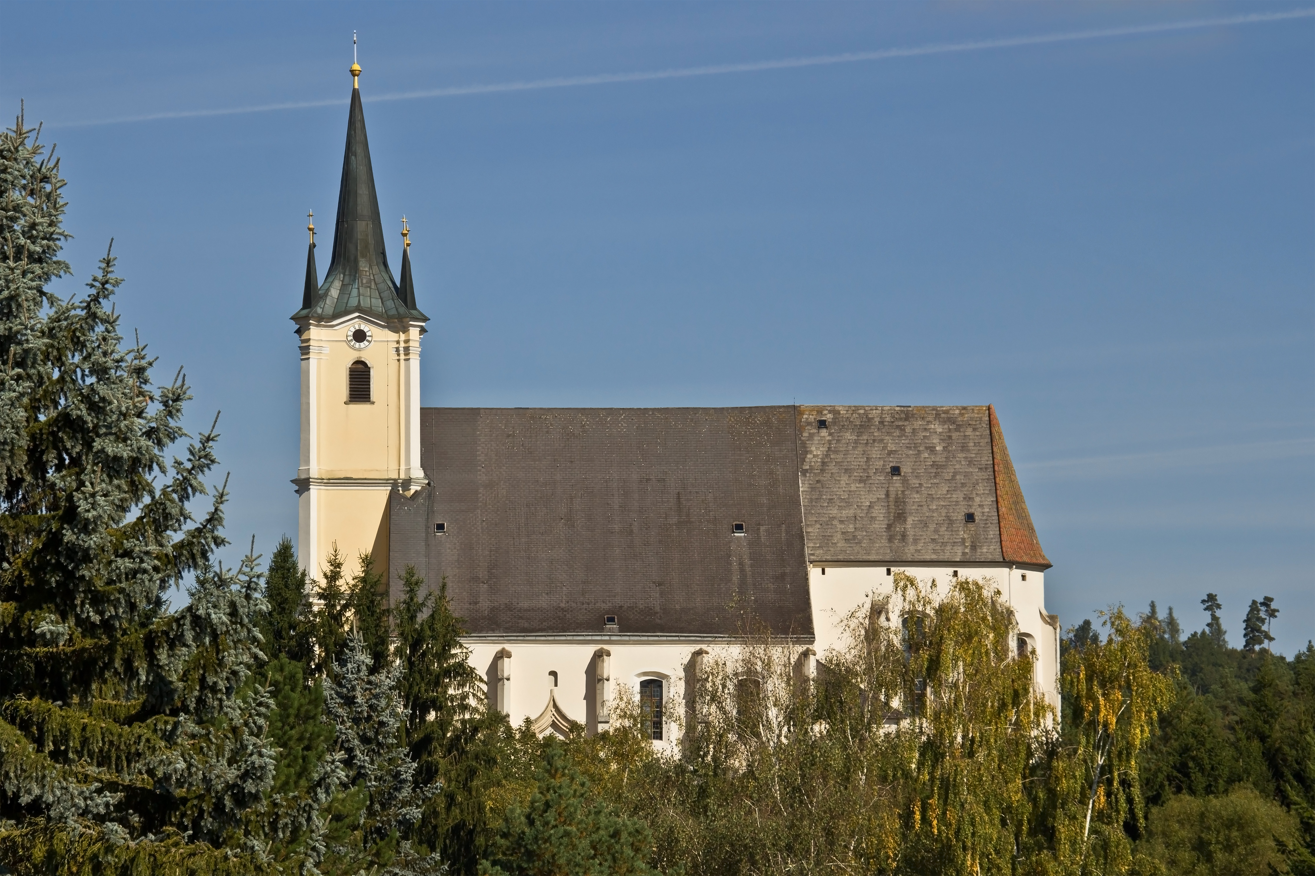 Die Pfarrkirche in Drosendorf ist eine spätgotische Staffelkirche aus der Zeit um 1517 mit barockisiertem Innenraum.